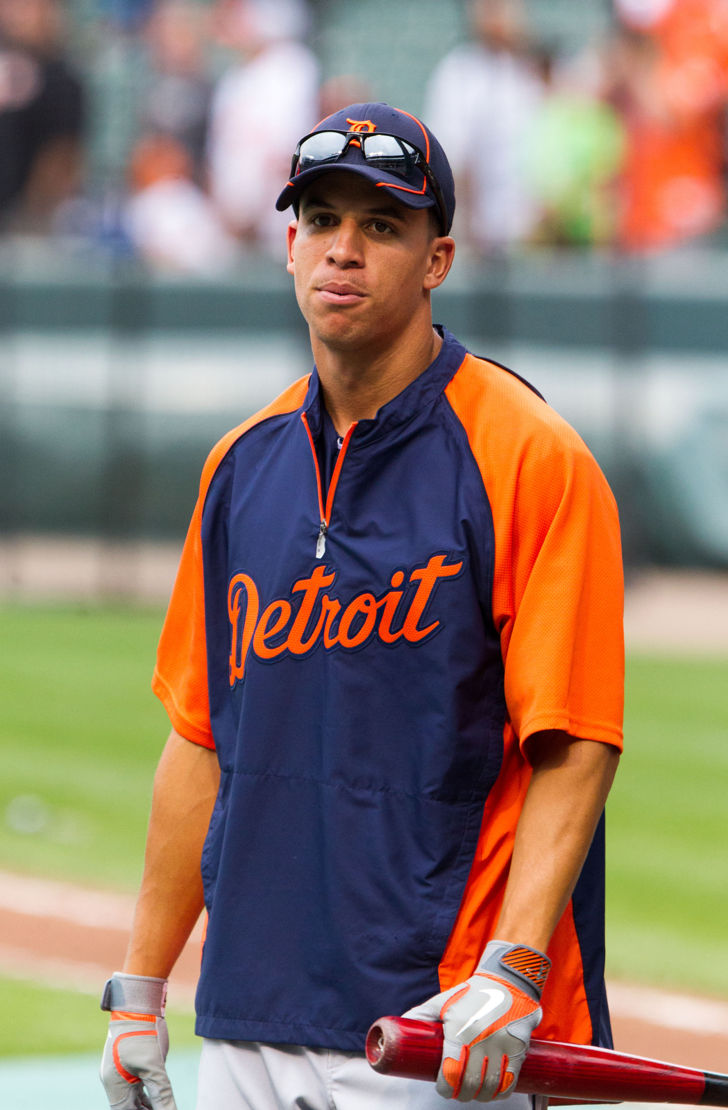 Quintin Berry